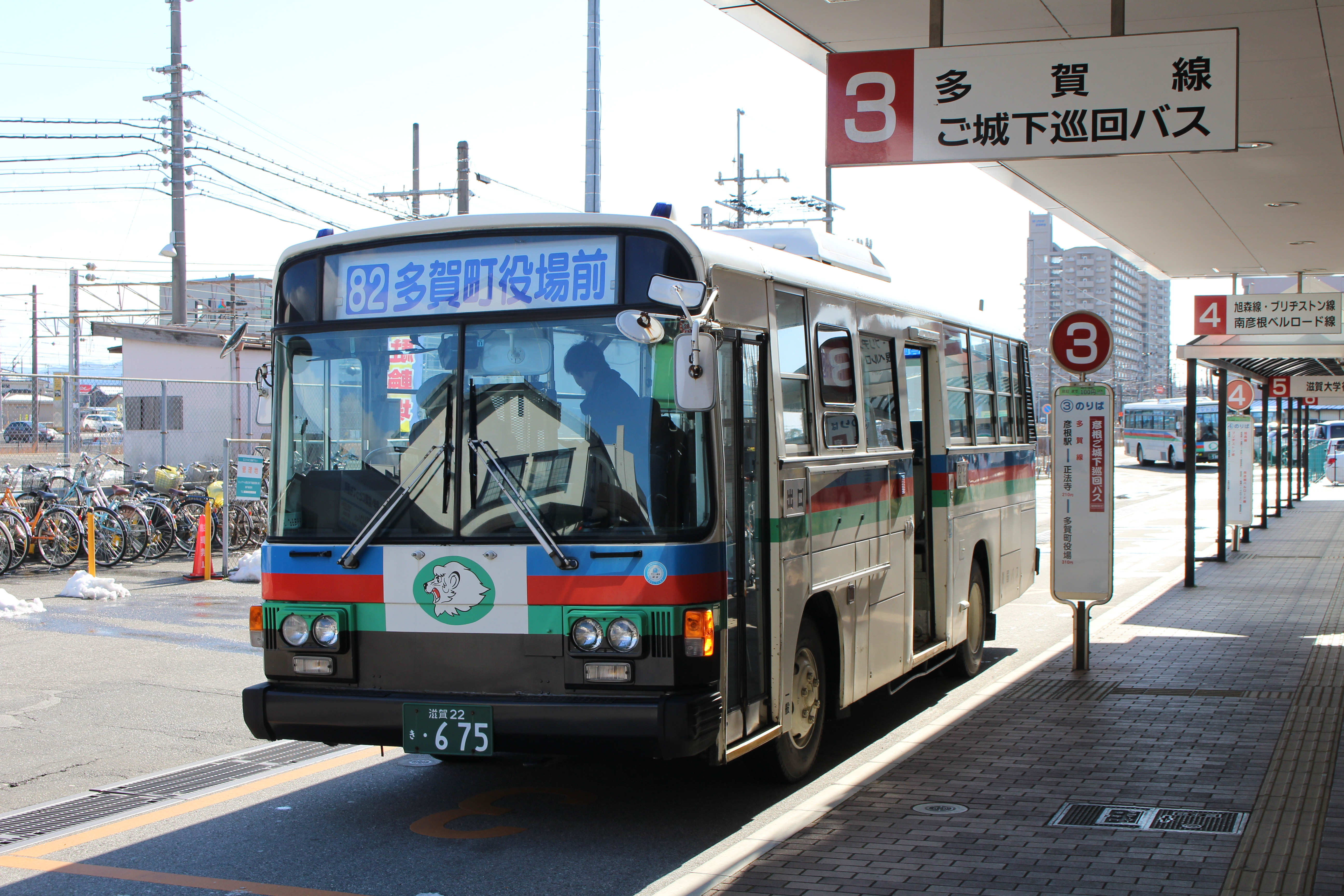 ６Ｅ 彦根営業所